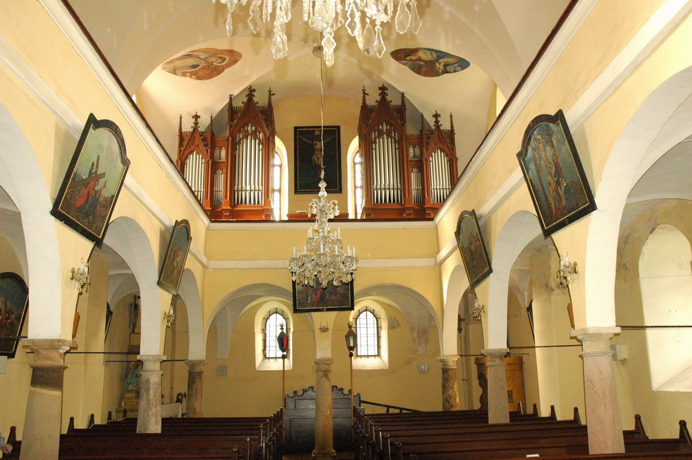 Kruchta; kostel sv. Václava, Rudník (TU)